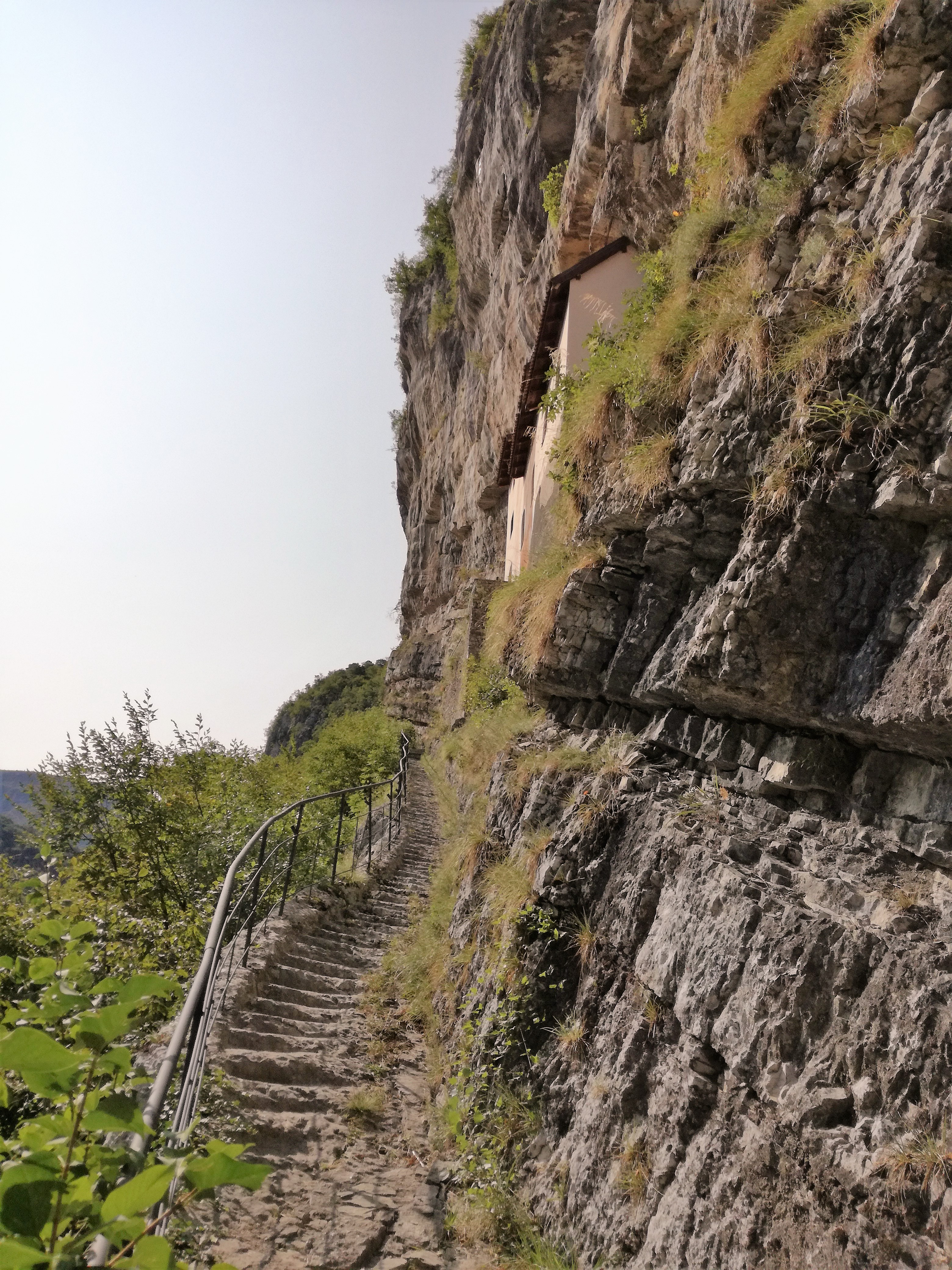 San Colombano - Felsstufen